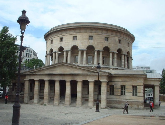 Rotonde de la Villette, Paris. Architect: Claude Nicolas Ledoux